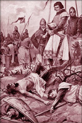 Věnceslav Černý - Rudolf Habsburský nad mrtvolou Přemysla Otakara II.